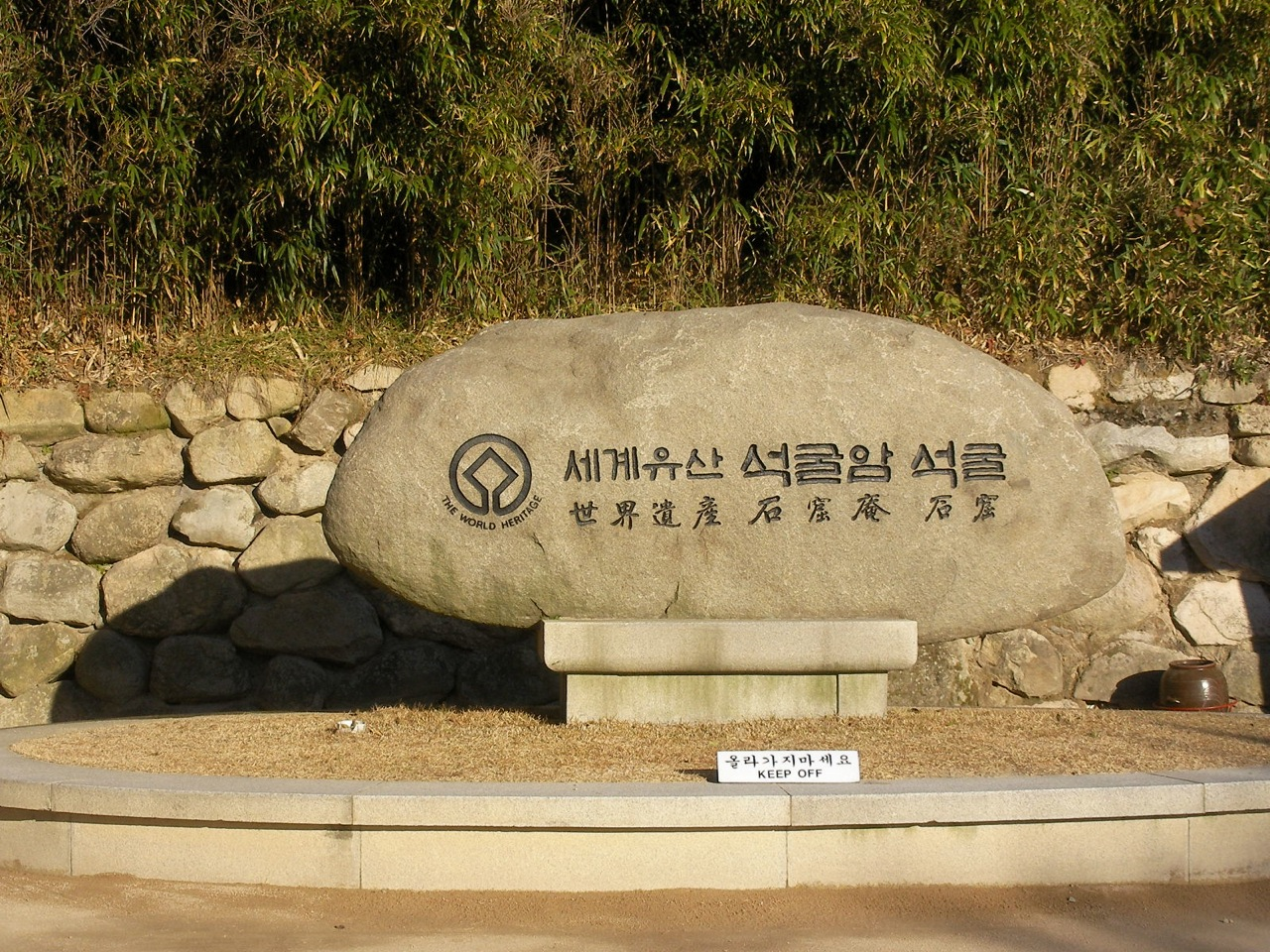 Seokguram (석굴암)